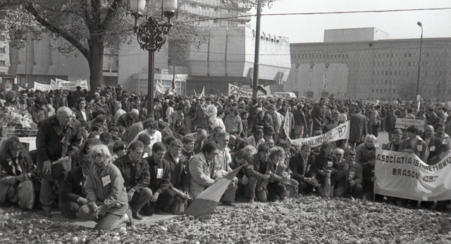 Miting în Piaţa Universităţii din Bucureşti, 1990